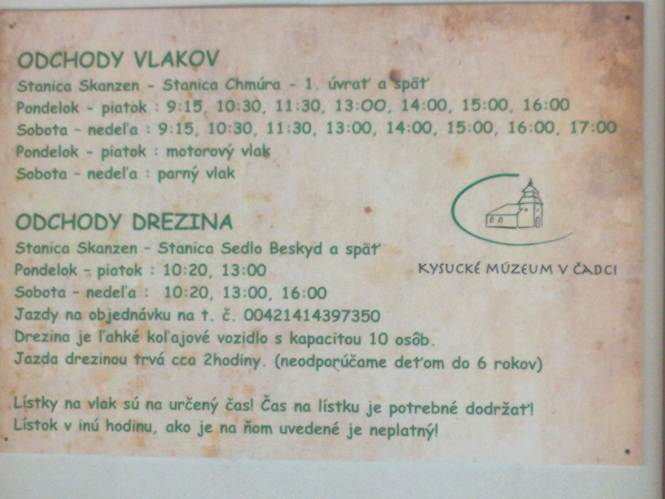 Jízdní řád vlaků na HLÚŽ Vychylovka